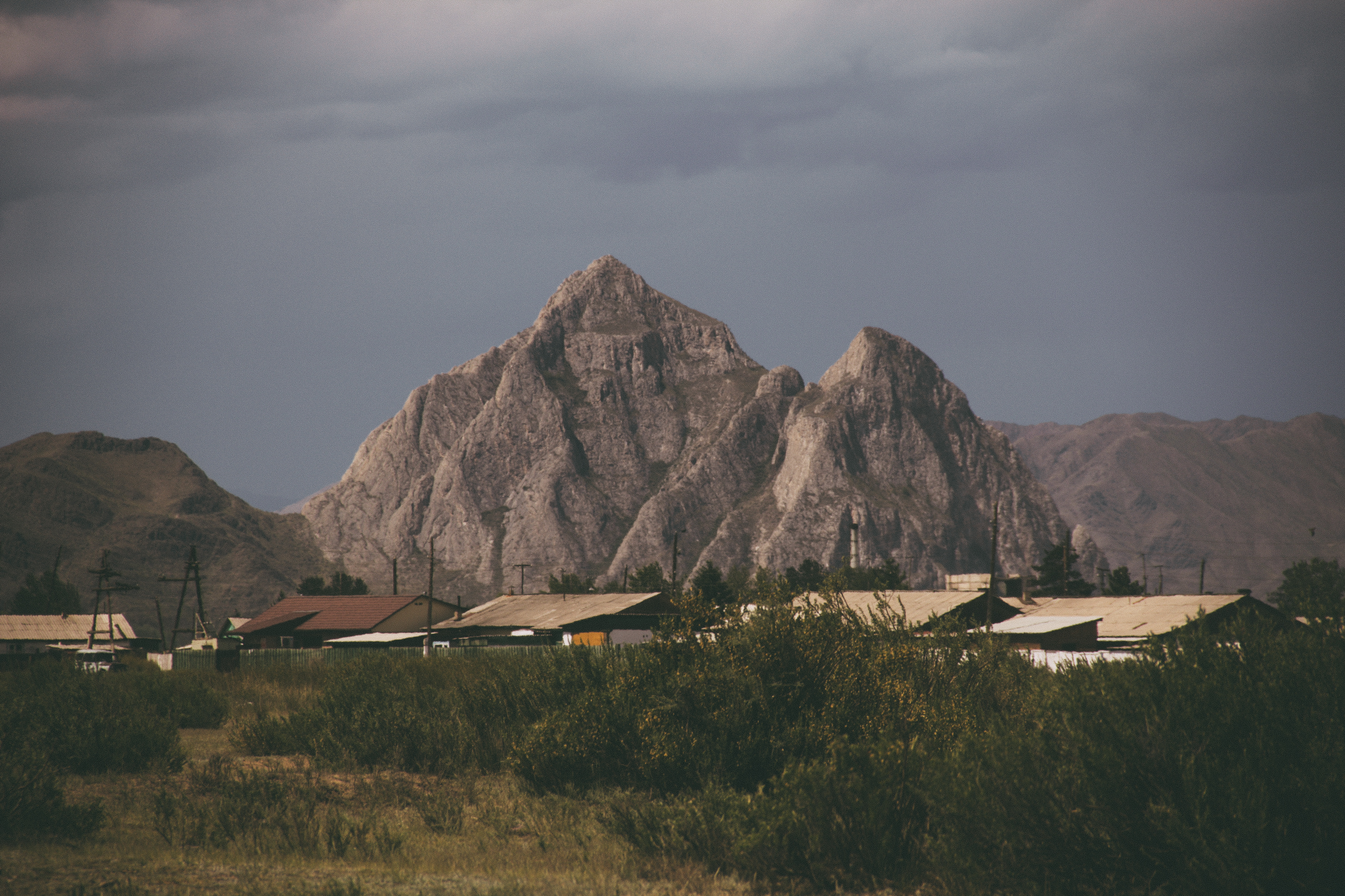 гора "Хайыракан" Улуг-Хемский район Республики Тува.